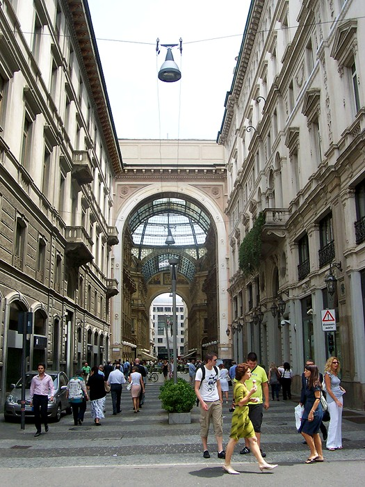 Milano - Galleria Vittorio Emanuele II (Ingresso di Via Tommaso Grossi)